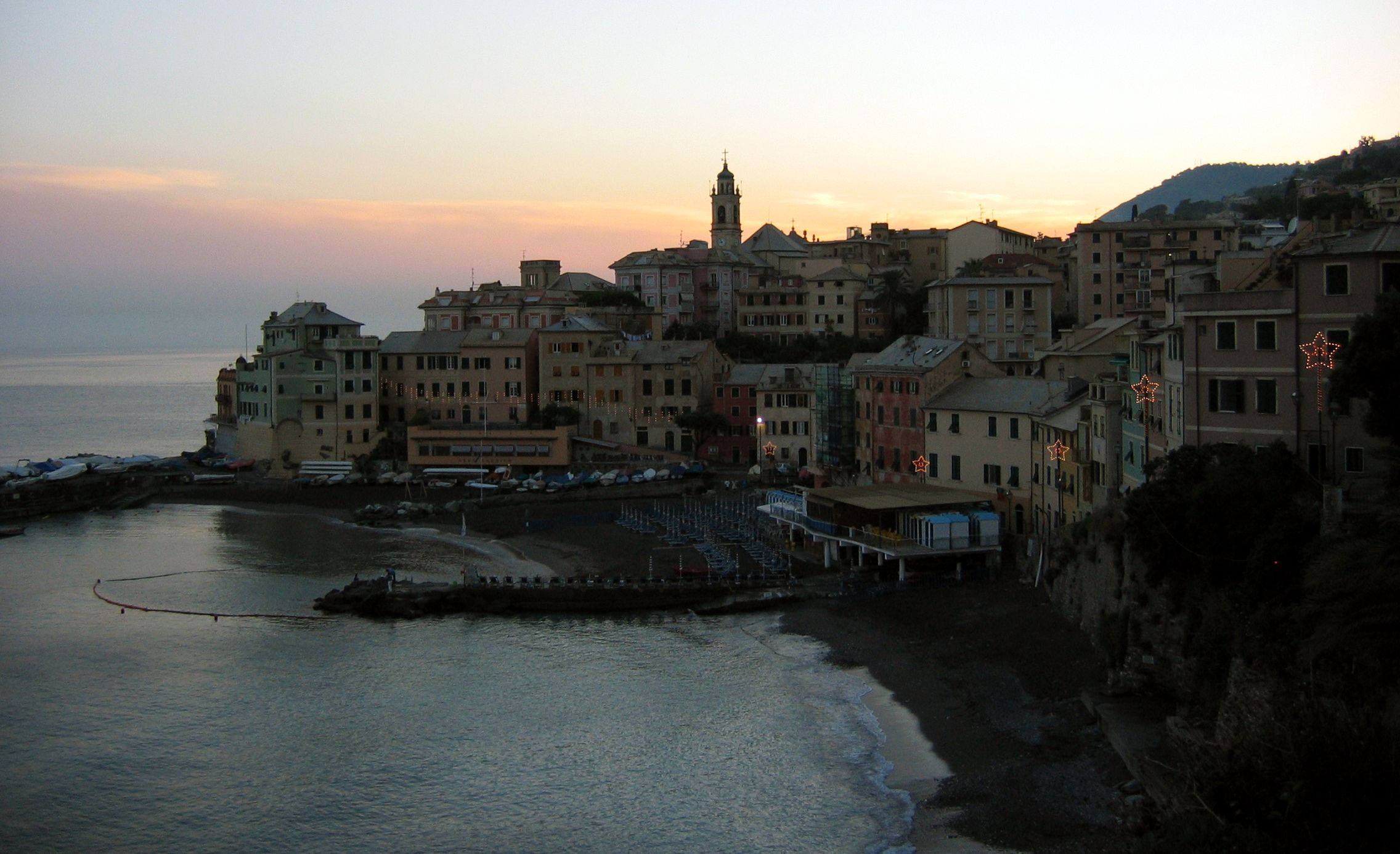 Bogliasco (Italy)